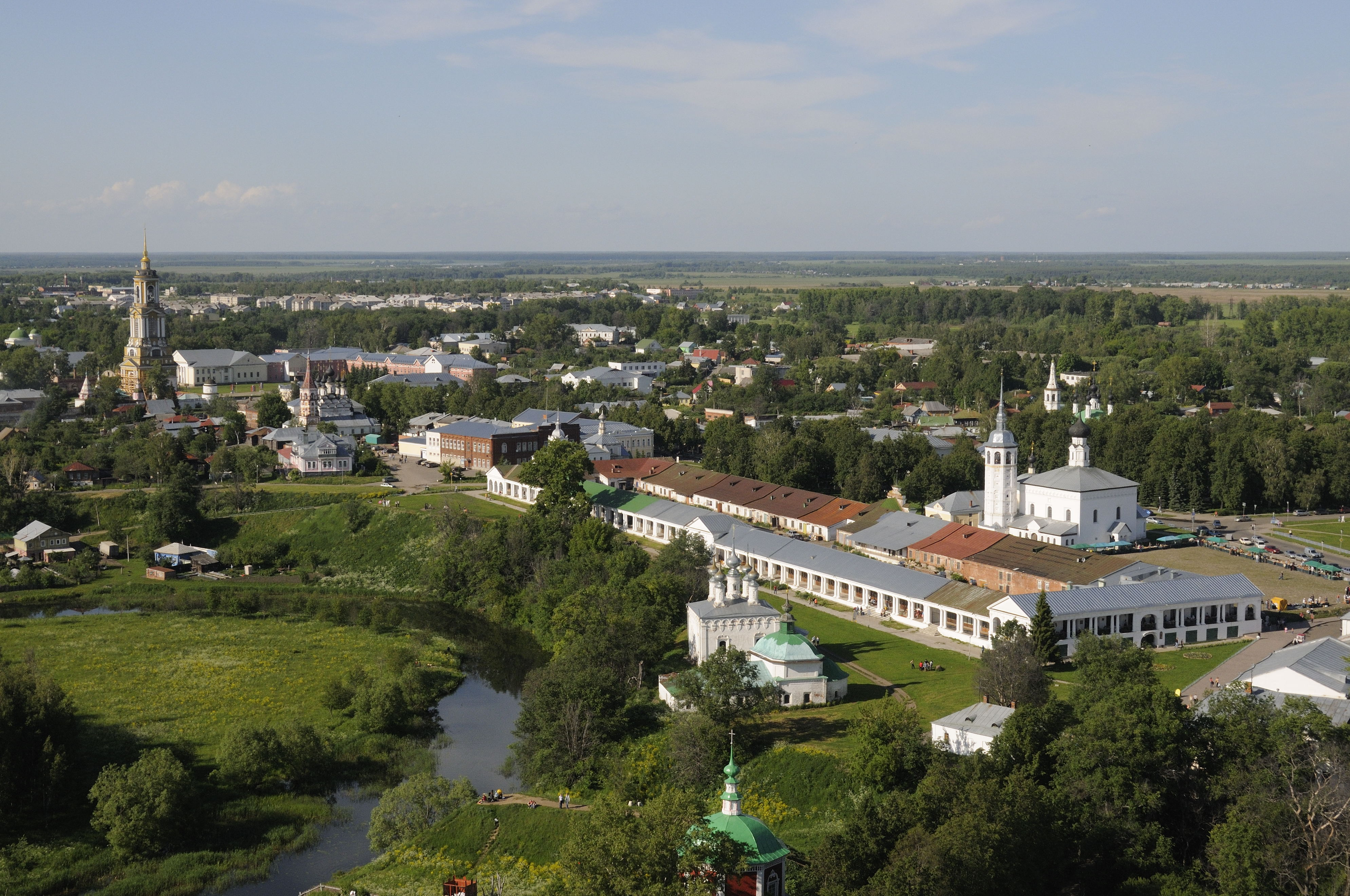 Суздаль